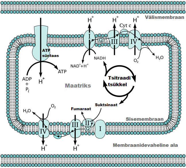 Mitokondriaalne elektronide transportahel